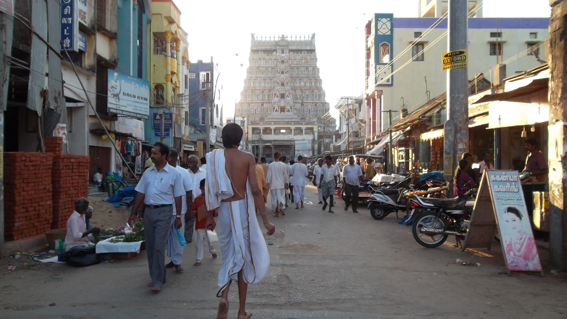 பஜனை கோஷ்டி -சிதம்பரம் கோவில் வீதி